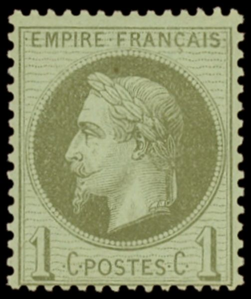 Stamps, France Napoleon III, 1870, 1 centime "Lauré" / Timbre de France, Napoleon III serie Lauré, 1870.